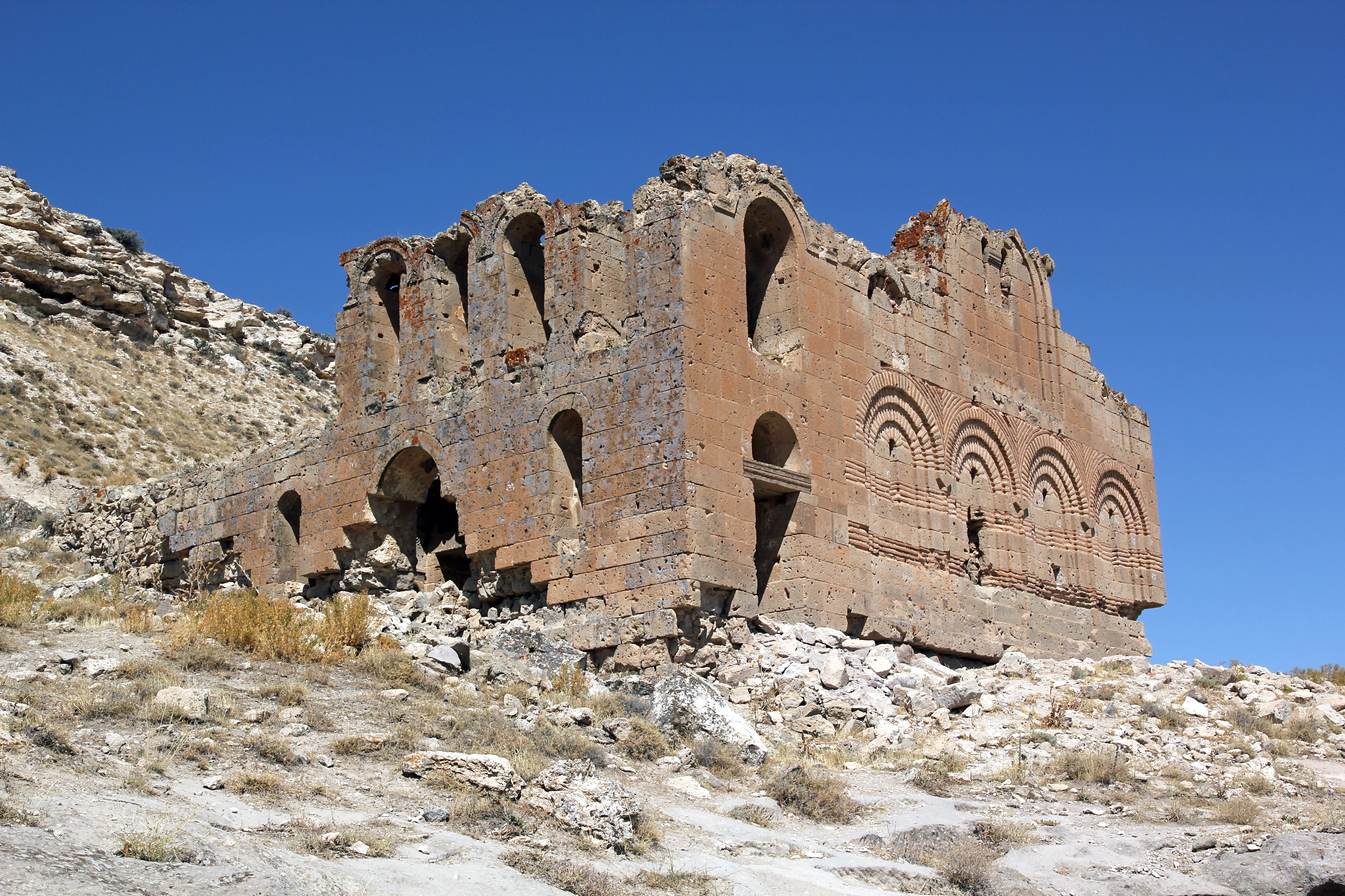 Çanlı Kilise, Byzantinische Kirche bei Aksaray, Kappadokien, Türkei, Ansicht von Süden